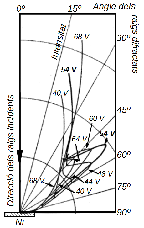 Intensitat dels electrons difractats en l'experiment de Davisson-Germer respecte de l'angle de difracció per a vàries diferències de potencial dels electrons incidents i per a l'azimut-{111 }